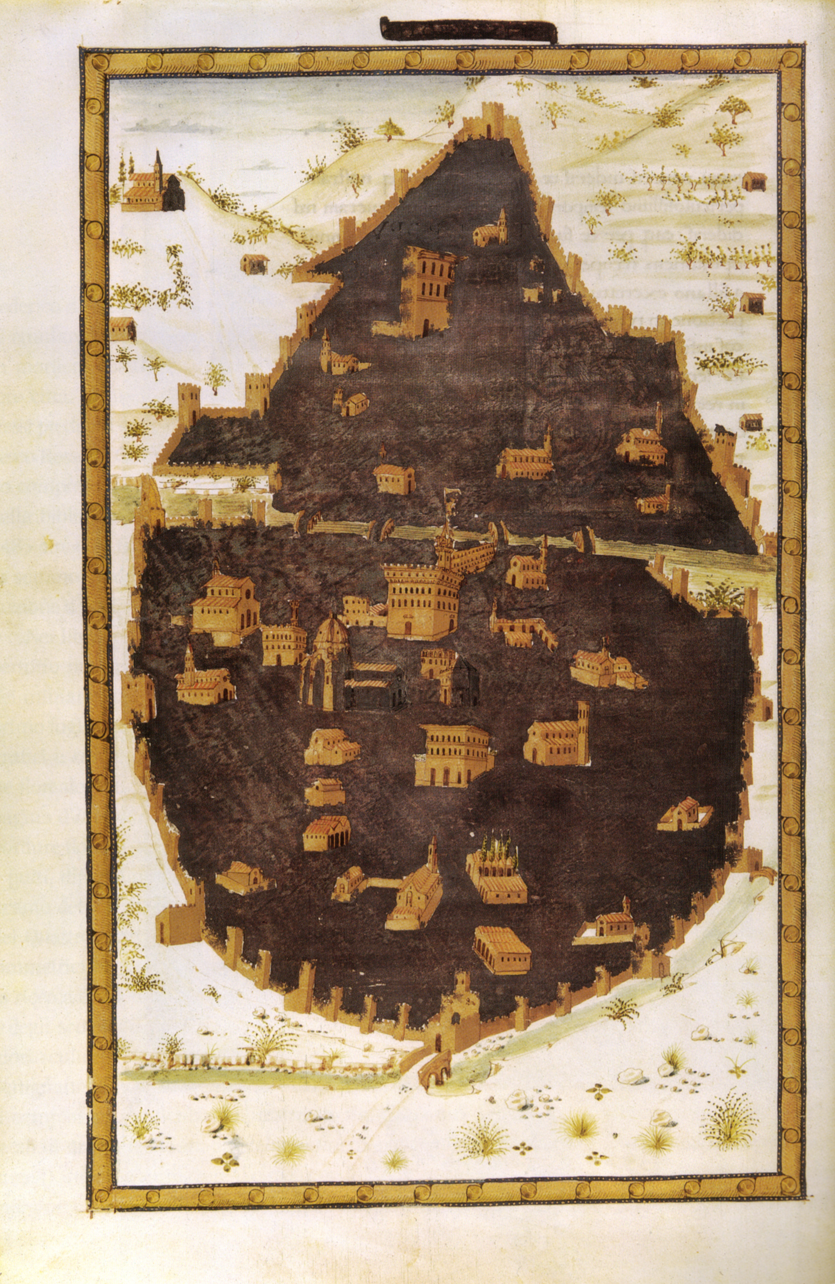 Miniatore fiorentino, pianta di firenze da poggio bracciolini historia florentina, bibl ap vaticana, ms. urb lat 491 f 4v